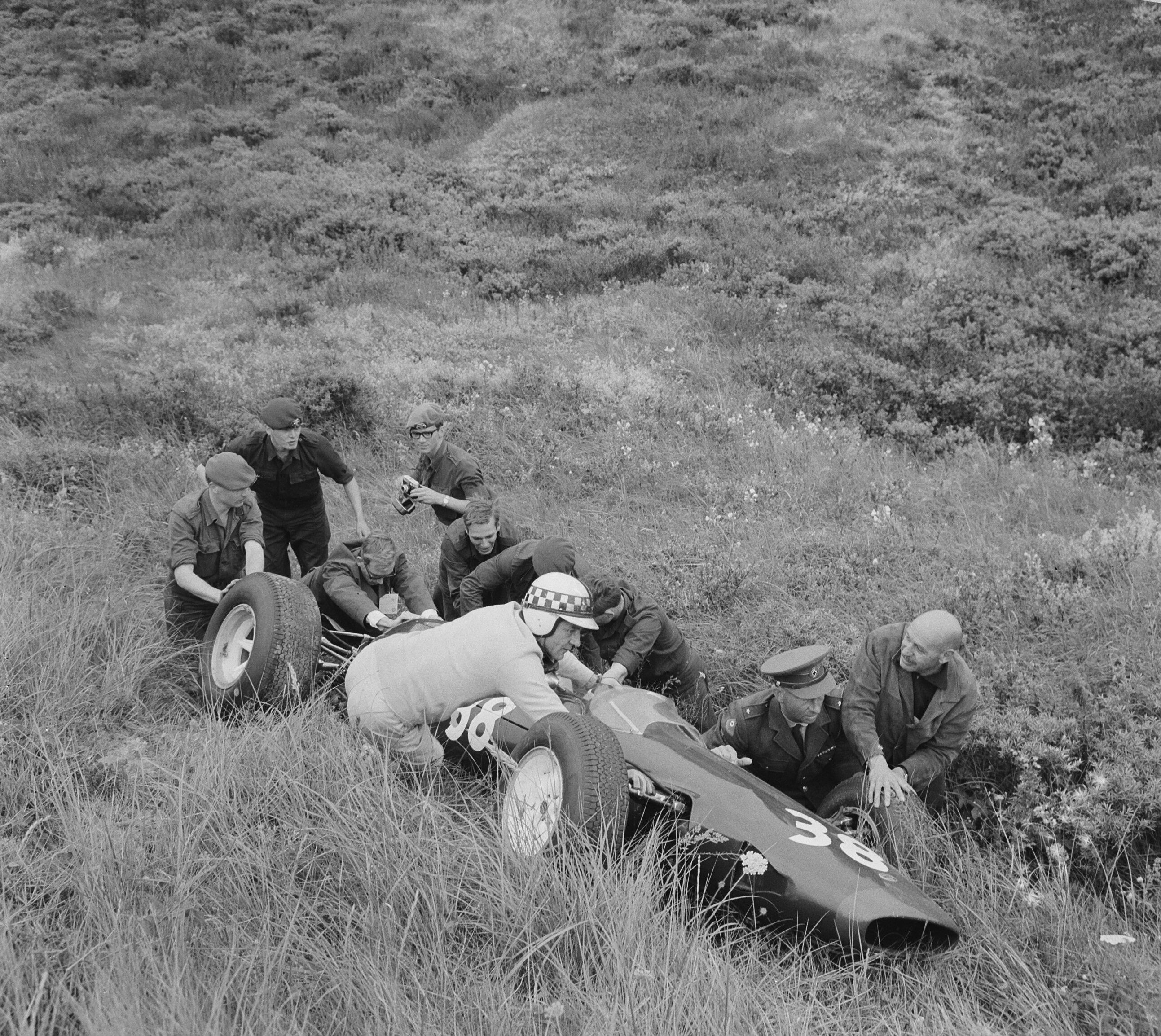 Collectie / Archief : Fotocollectie Anefo Reportage / Serie : [ onbekend ] Beschrijving : Training Zandvoort Grand Prix , enige soldaten helpen coureur Innes Ireland met zijn uit de baan geraakte auto Datum : 16 juli 1965 Locatie : Noord-Holland, Zandvoort Trefwoorden : autosport Persoonsnaam : Ireland, Innes Fotograaf : Nijs, Jac. de / Anefo Auteursrechthebbende : Nationaal Archief Materiaalsoort : Negatief (zwart/wit) Nummer archiefinventaris : bekijk toegang 2.24.01.03 Bestanddeelnummer : 917-9721